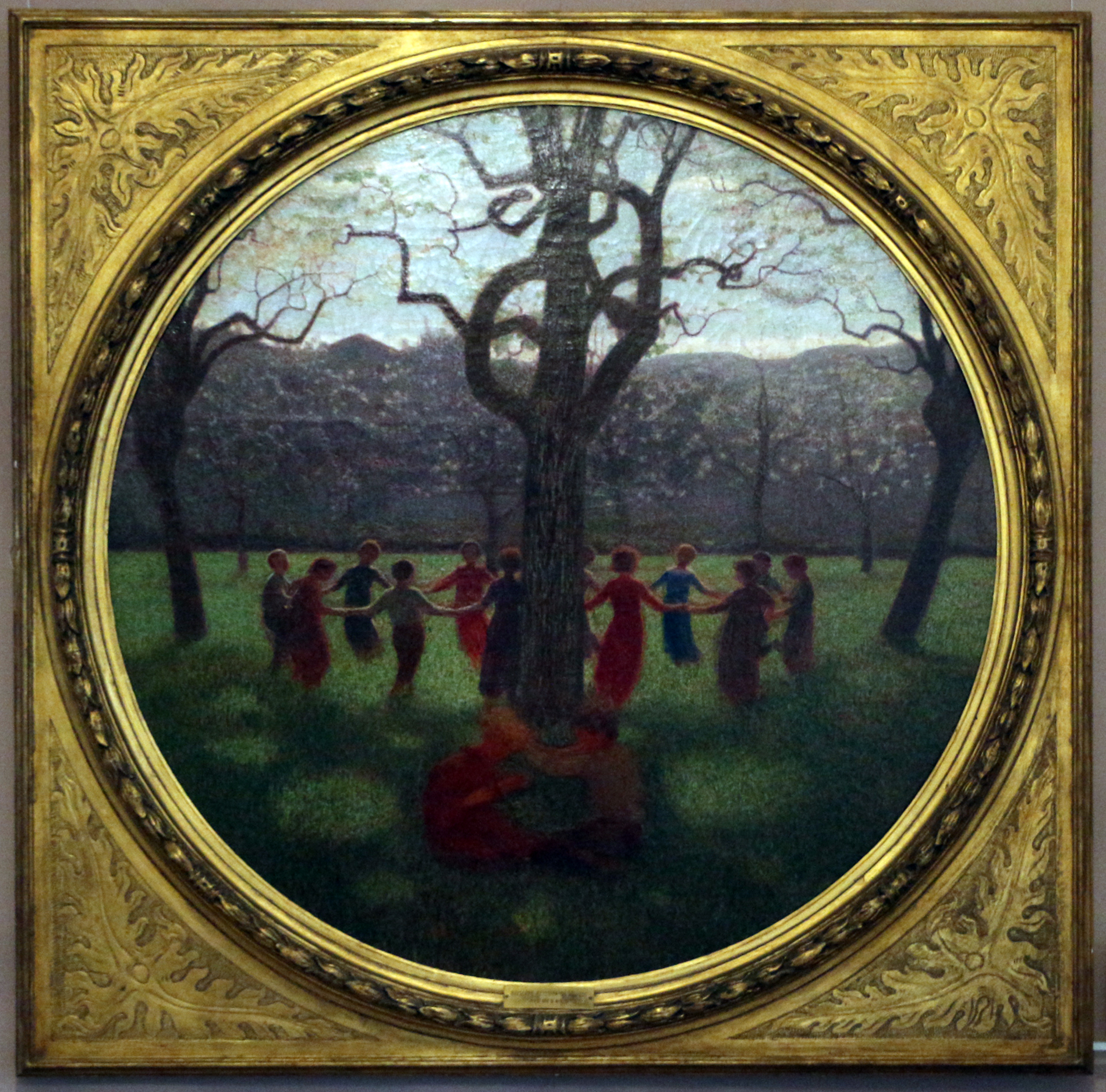 Villa Reale di Milano This is a photo of a monument which is part of cultural heritage of Italy.